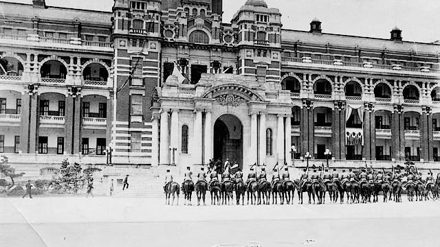 中文（台灣）: 騎著駿馬的騎兵們一列排開，在臺灣總督府（今臺灣總統府）前歡迎裕仁太子。